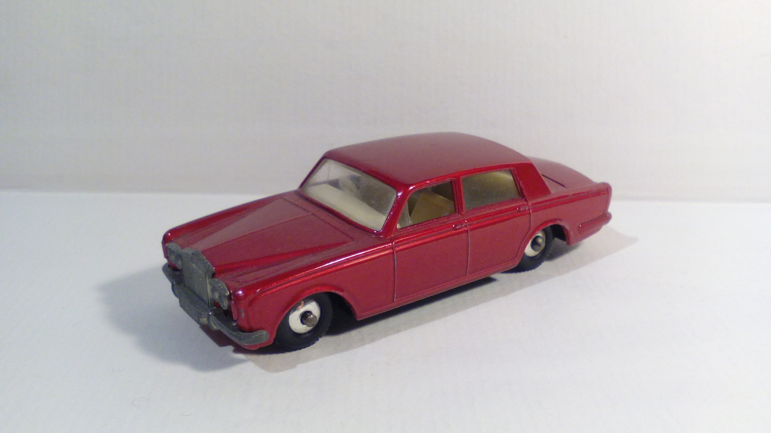 Matchbox Regular Wheels Rolls Royce Silver Shadow from the 60's